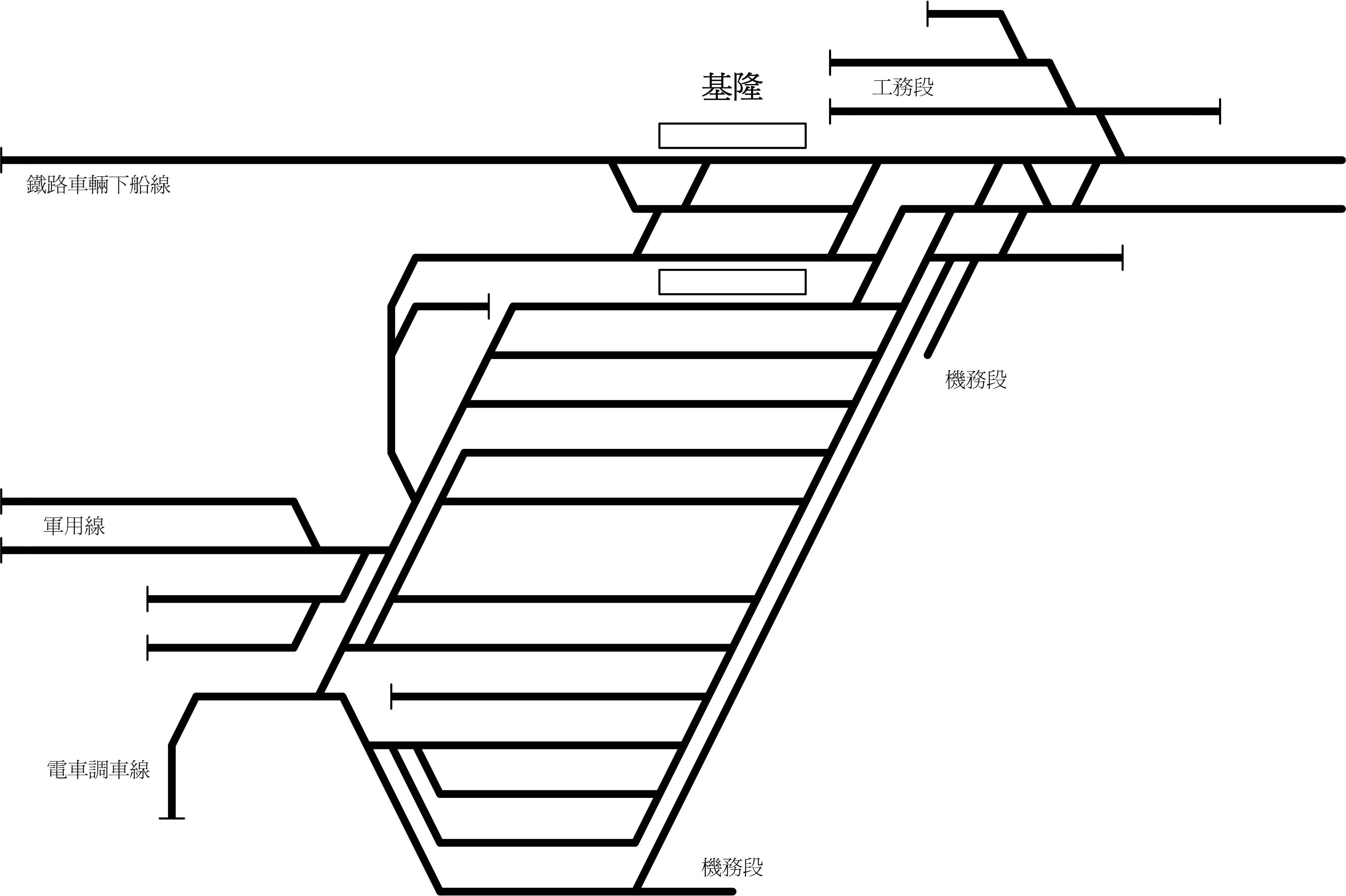 基隆車站軌道圖，使用 Microsoft Visio 繪製。